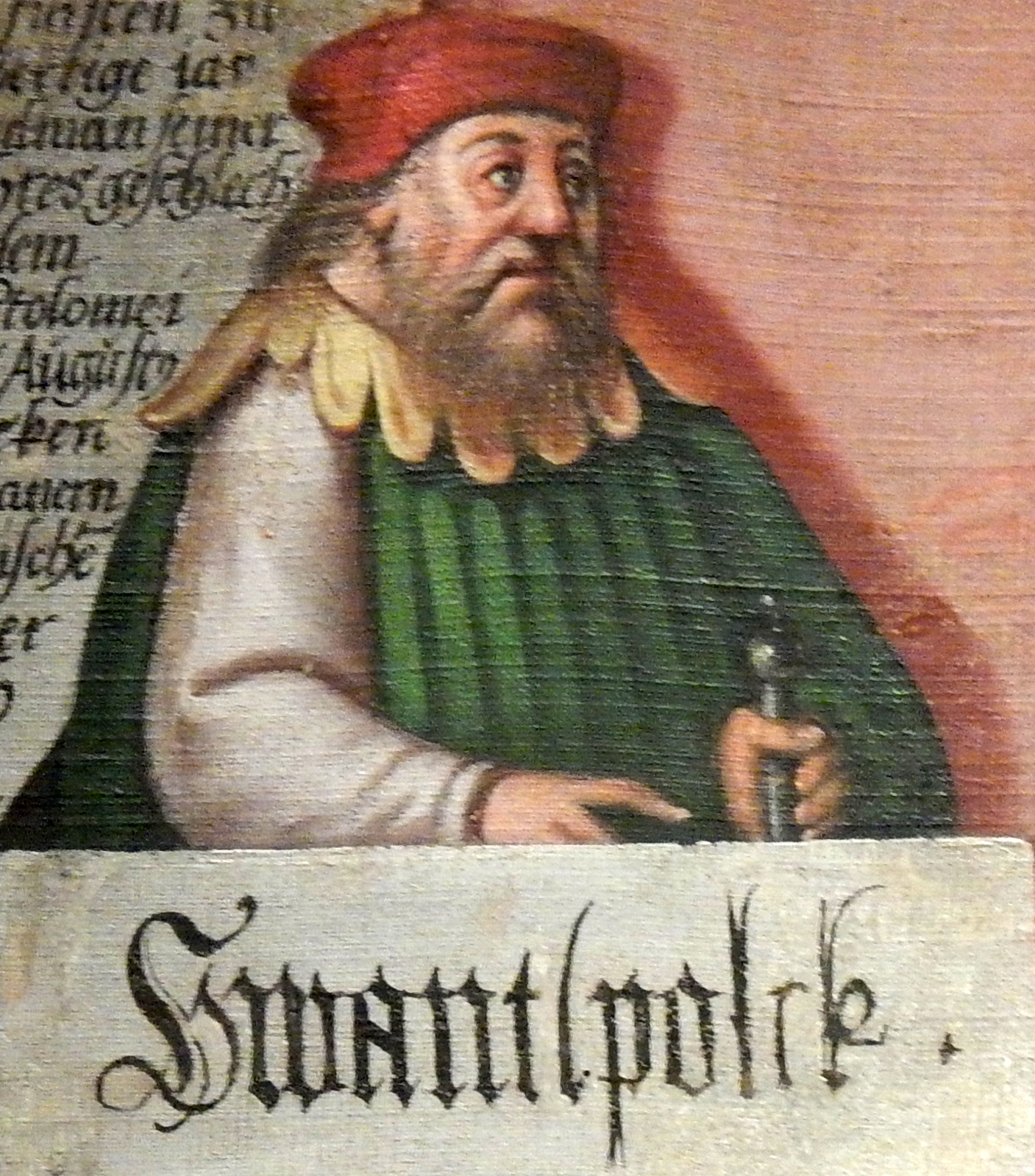 Swantopolk von Pommern.